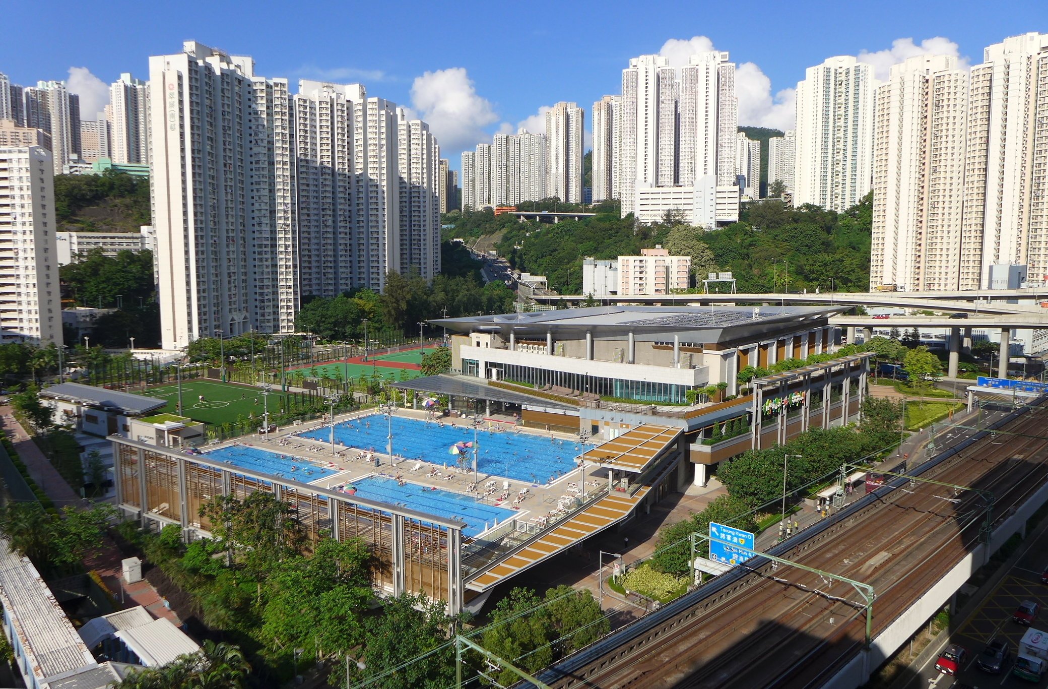 Kwun Tong Swimming Pool